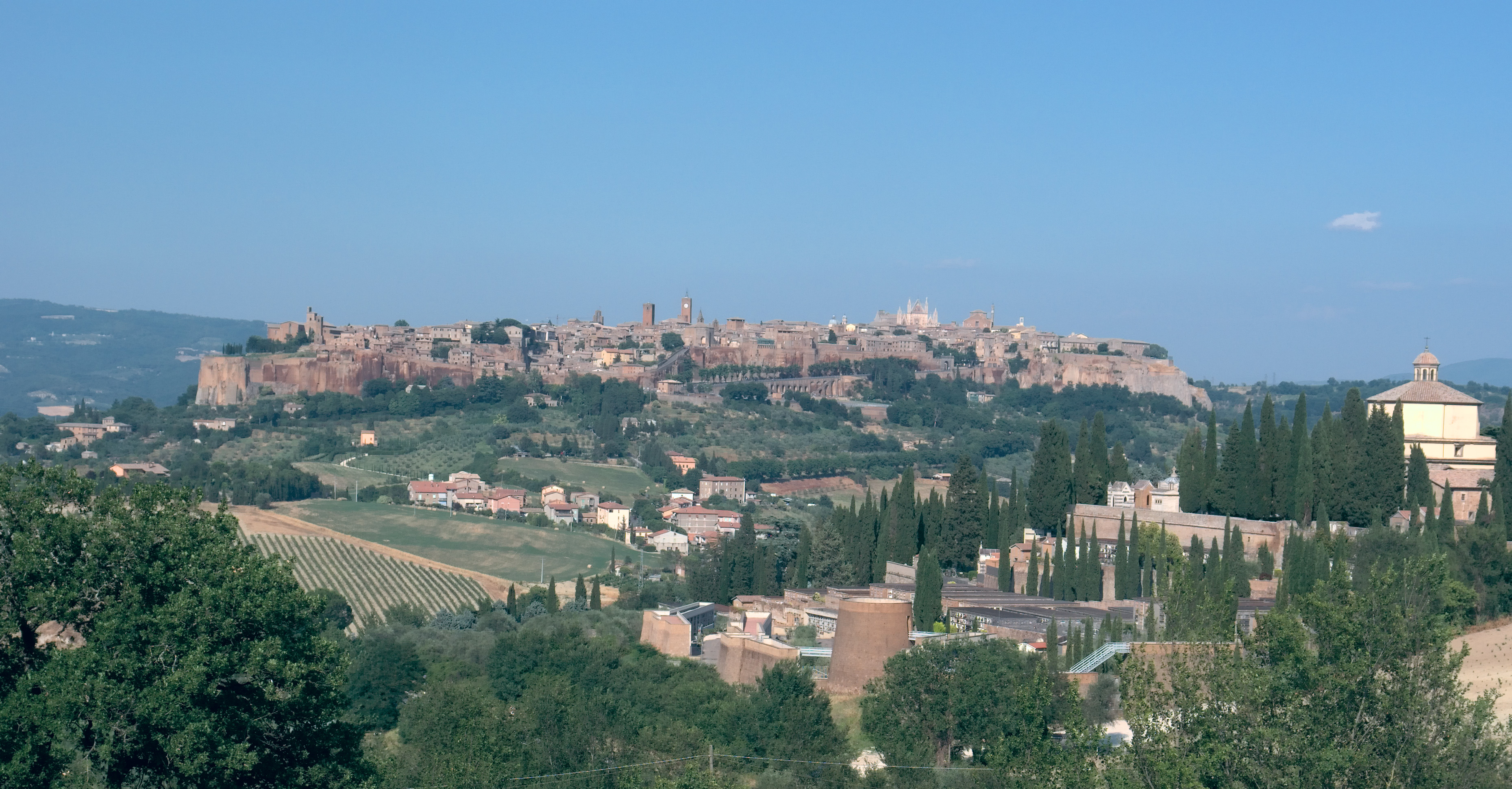 Orvieto, Stadtansicht